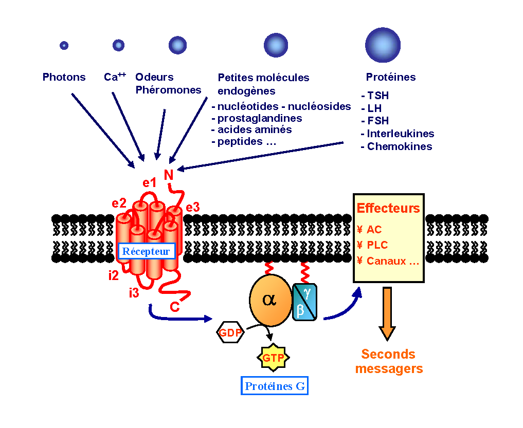 les RCPG